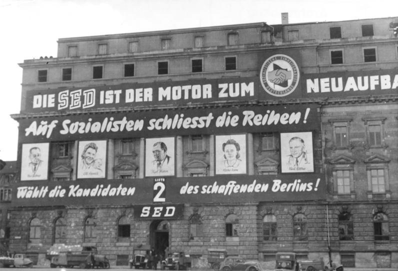 Berlin, Behrenstraße, SED-Wahlpropagenda Wahlpropagenda in Berlin Parteihaus der SED in der Behrenstrasse Aufn.: Illus-Heinscher, Okt. 46 304-46 [Berlin, Behrenstraße.- SED-Wahlpropagenda: "Die SED ist der Motor zum Neuaubau! Auf Sozialisten schliesst die Reihen! Wählt die Kandidaten des schaffenden Berlins!"]